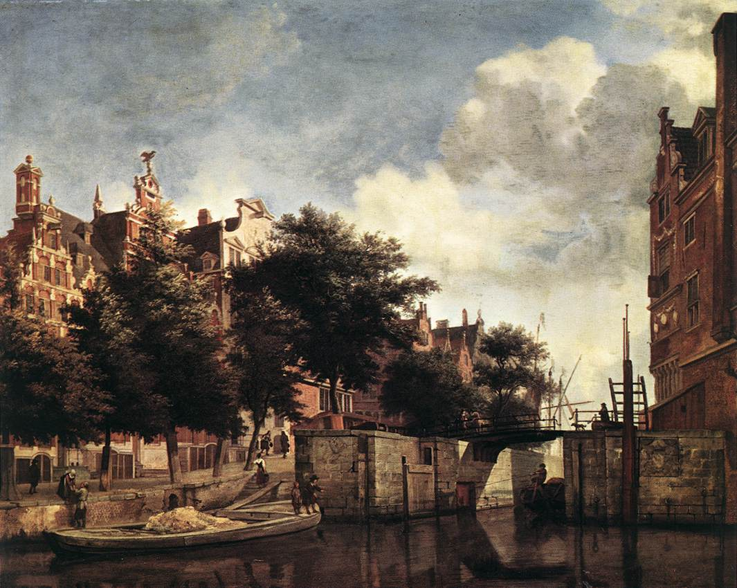 Gezicht op de Nieuwe Zijds Voorburgwal met de Oude Haarlemmersluis te Amsterdam. Links aan de gracht het huis Bartolotti, rechts een heiligenbeeld op de hoek boven het water. In het midden een ijzeren brug waarvan de pijlers zijn versierd met heraldische wapens met leeuwen. Op het water twee schuiten.; Jan van der Heyden (1637–1712), olieverf op paneel, ca. 1670